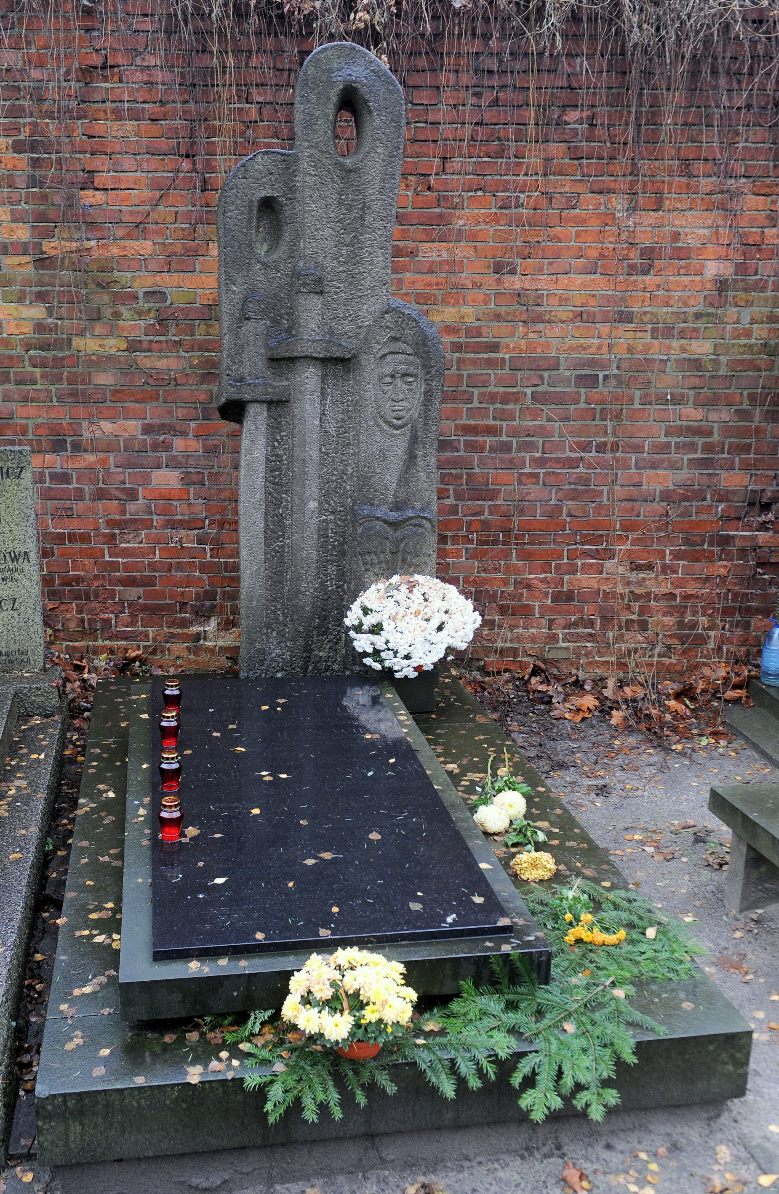 Grób Marka Szymańskiego "Sępa" na warszawskich Starych Powązkach (kw. 188, rz. 3)